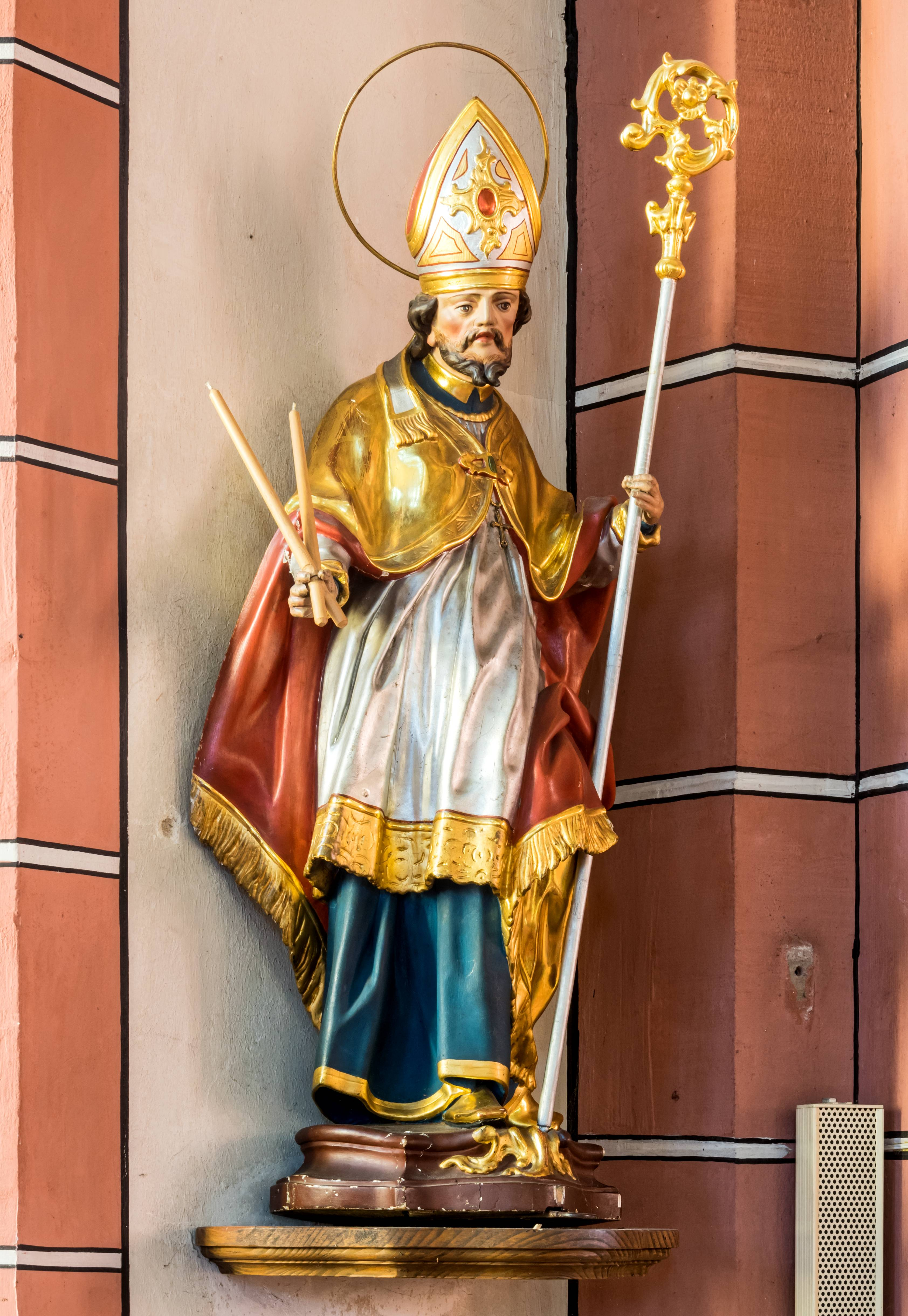 Die katholische Kirche St. Blasius im Glottertal Figur rechts am Chor